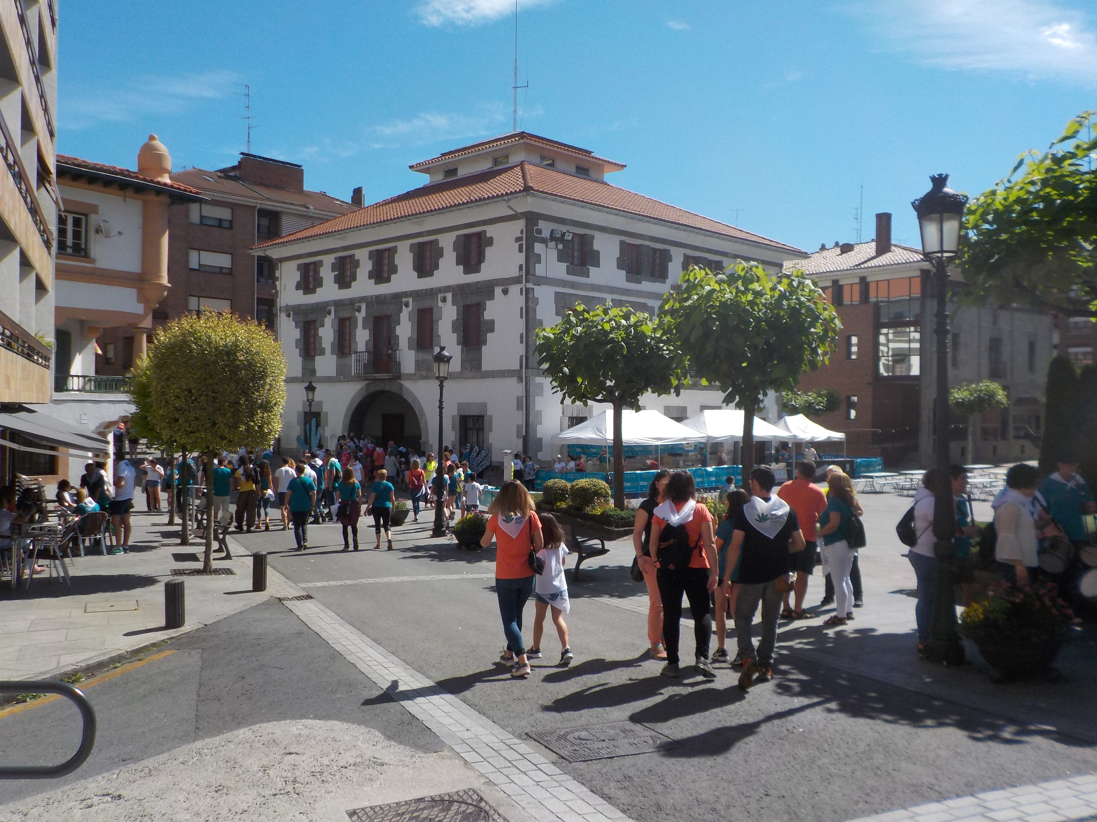 Arrigorriaga - Argala Plaza